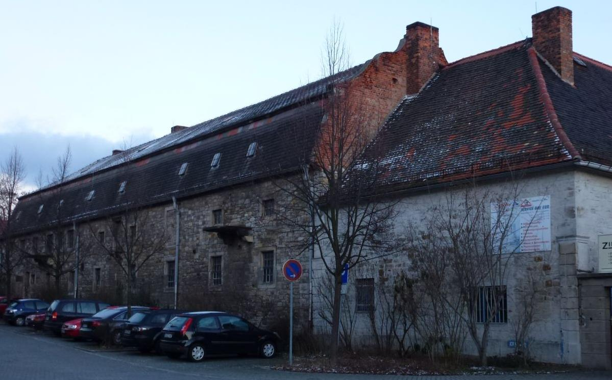 Rittergut in Burgwerben, Weißenfels, Sachsen-Anhalt